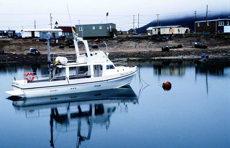 Modern yacht (Qikiqtarjuaq, Nunavut)